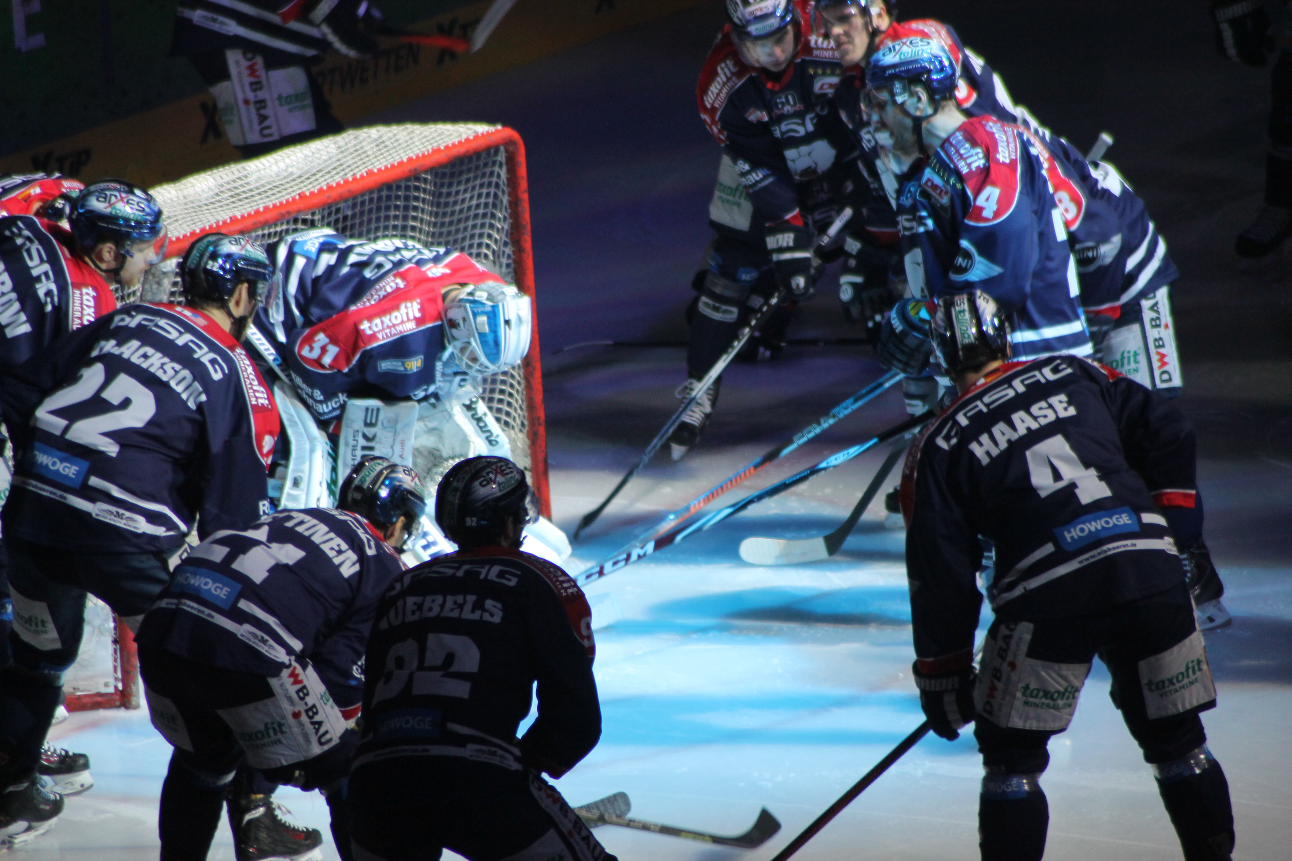 Eisbären Berlin gegen Nürnberg Ice Tigers in der O2-World Berlin am 15.02.2015